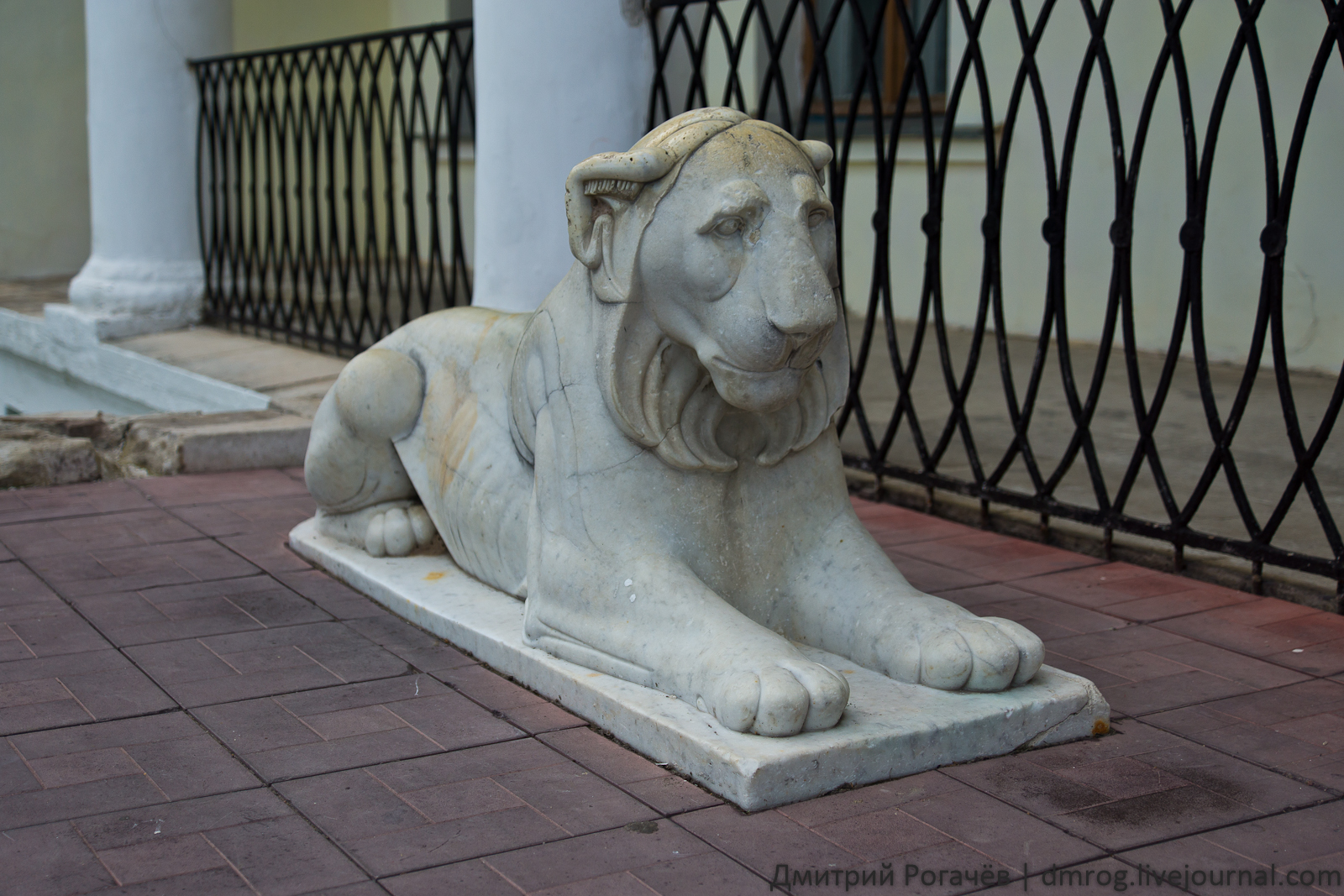 Скульптура около входа во дворец